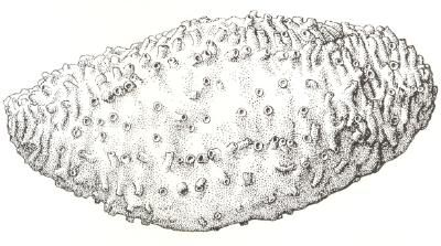 Thyone pseudofusus Deichmann, 1930